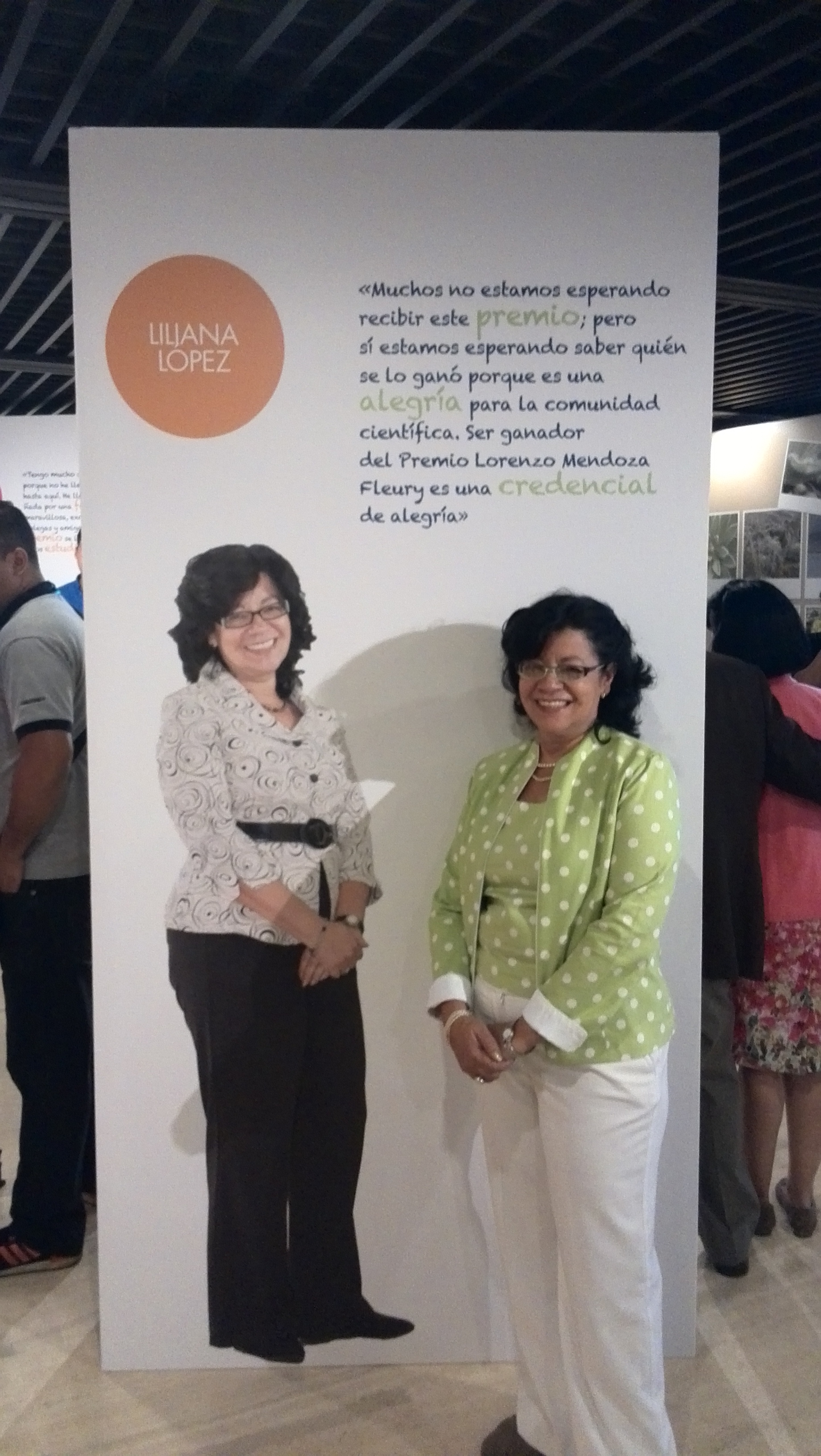 Liliana López en la entrega del Premio Lorenzo Mendoza Fleury